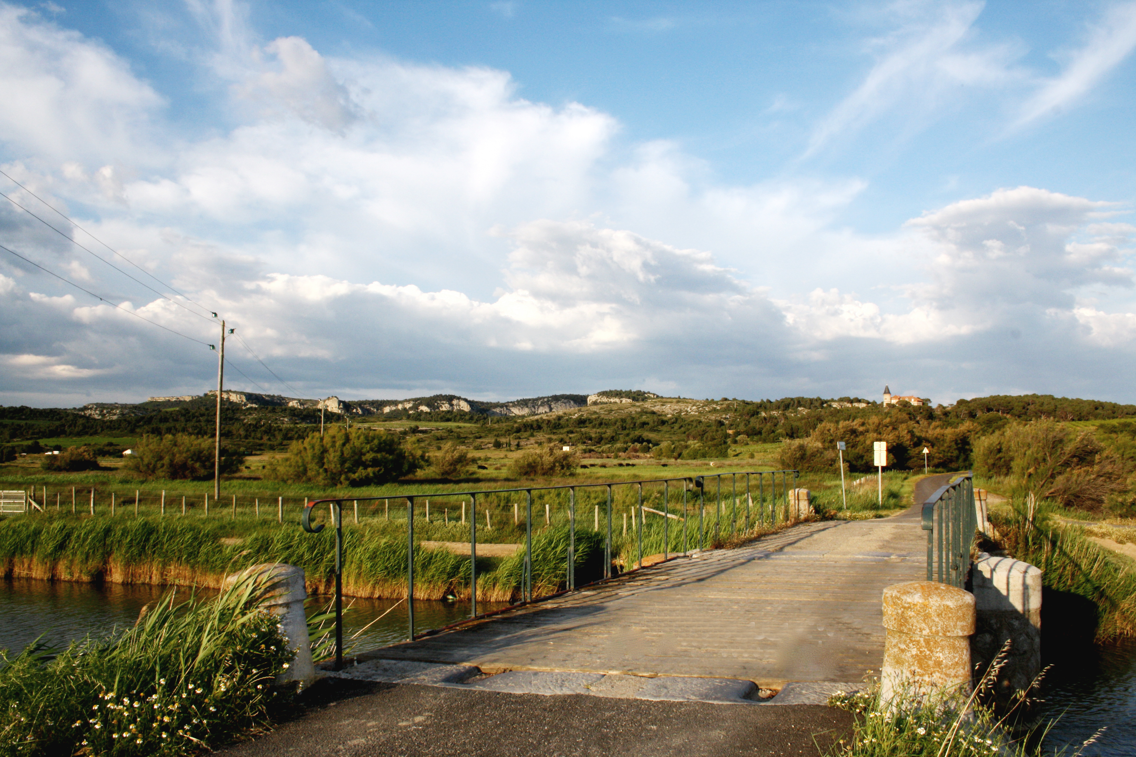 AOC Languedoc La Clape